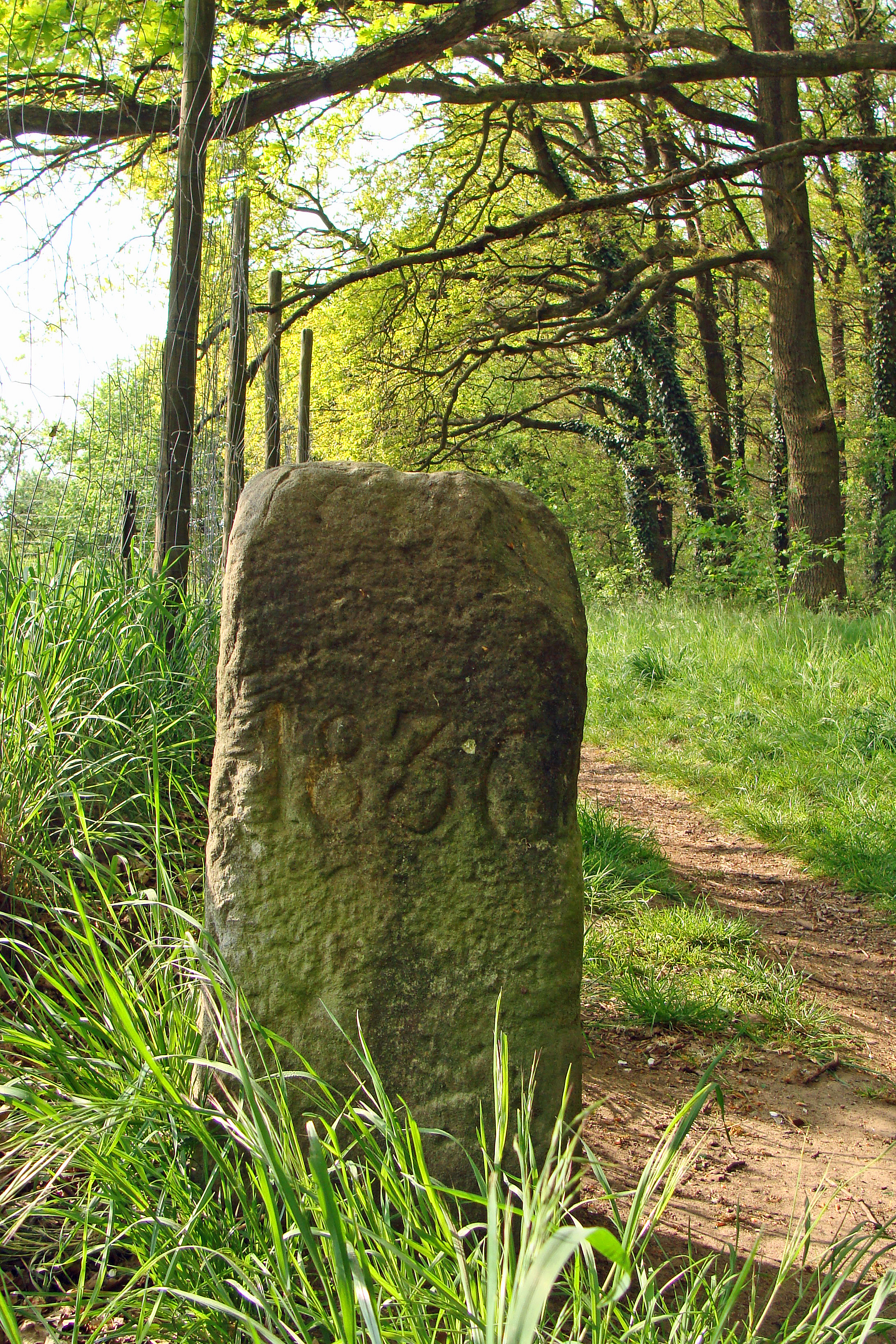 Borne-frontière datant de 1830, située entre la rue d'Überherrn et la cité Bois-Richard marquant frontière entre la France et l'Allemagne.